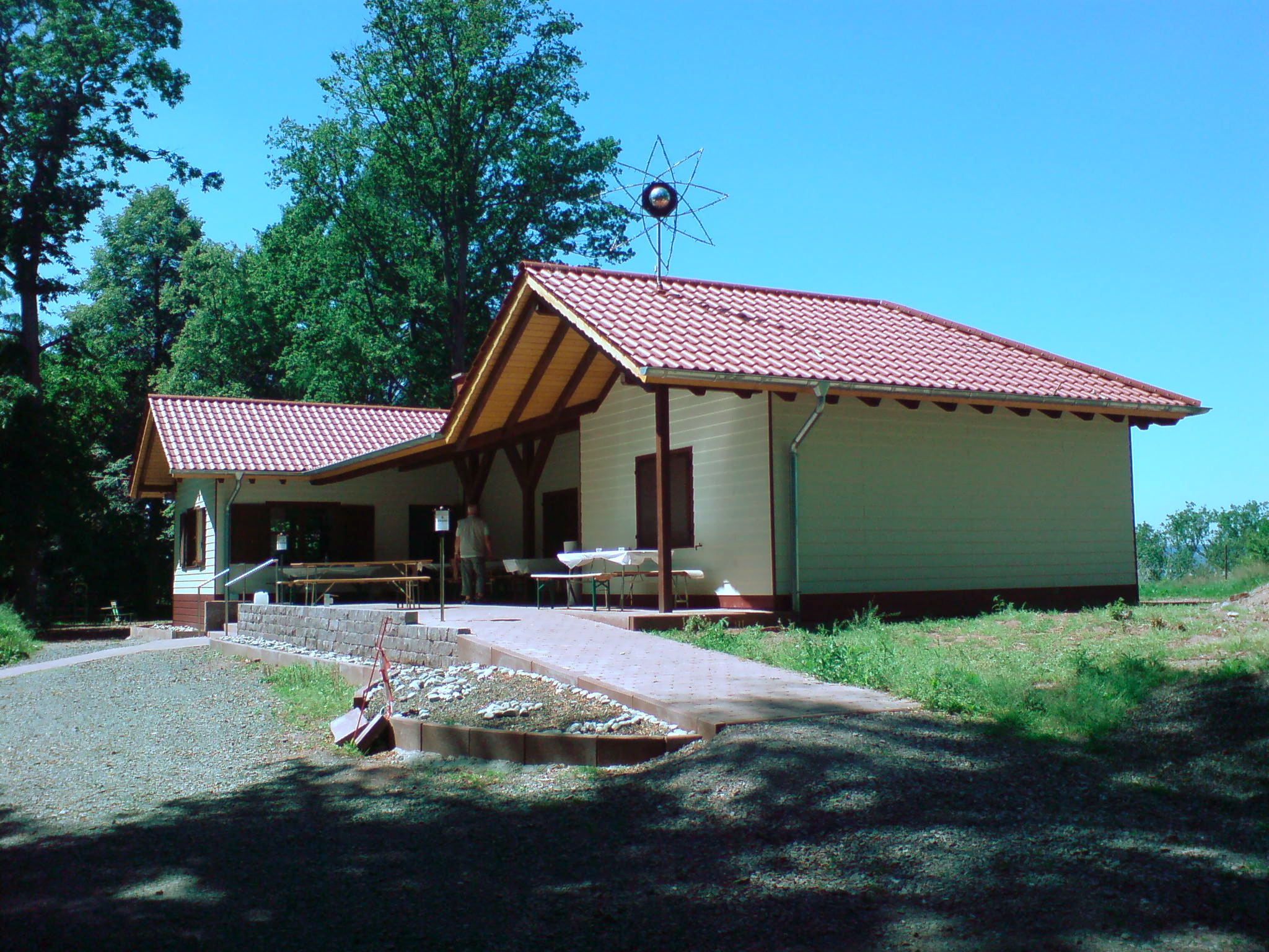 Die Gustav Köhlerhütte auf dem Kehrberg bei Bruchhof.